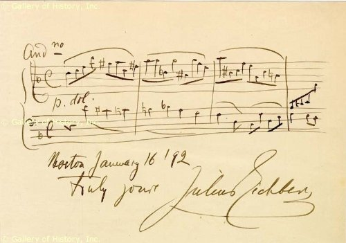 zwei Notenzeilen mit Widmung von Julius Eichberg